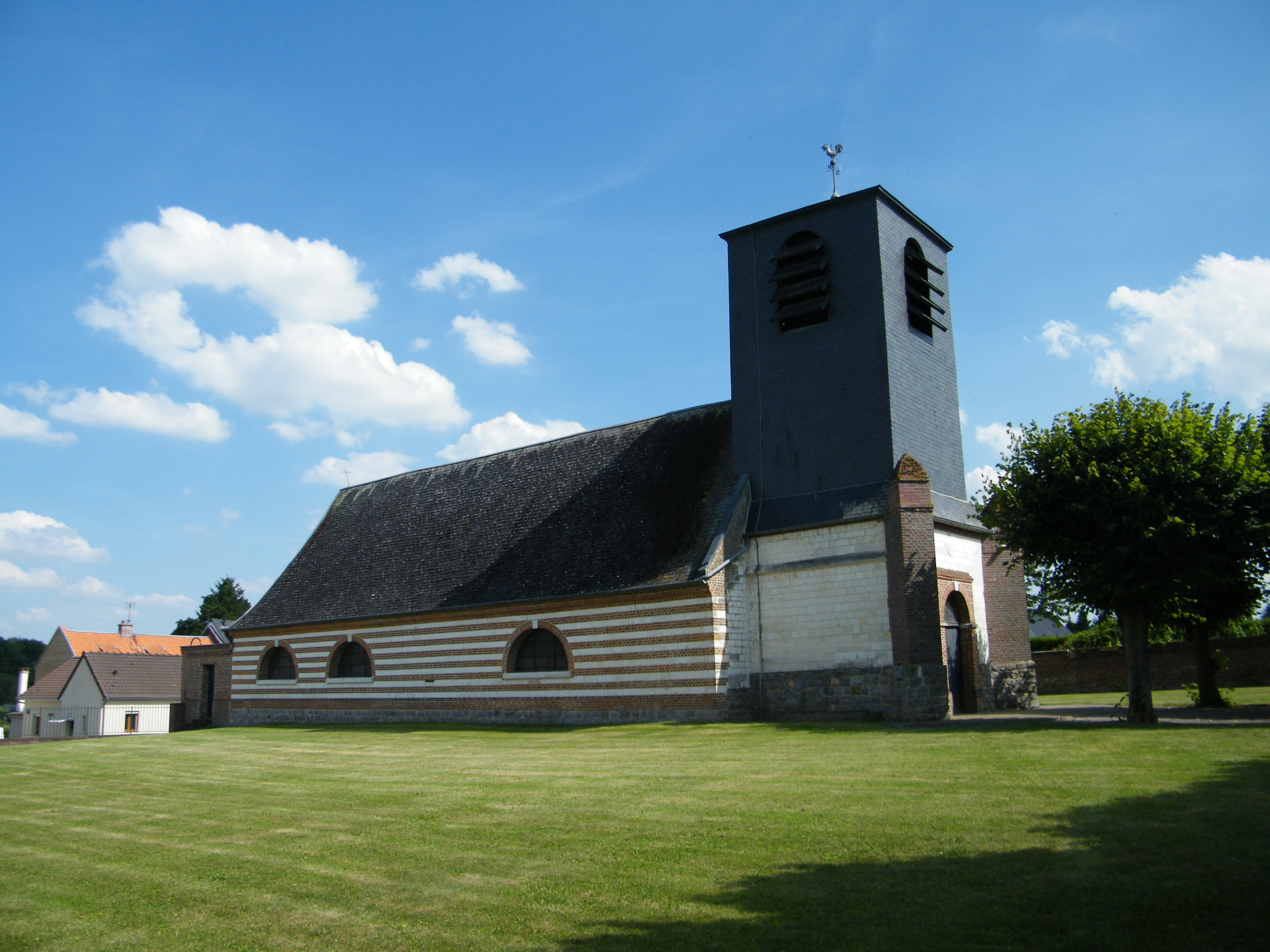 Vue de l'église Sainte-Colombe, côté sud.